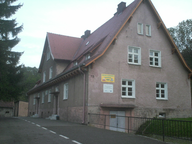 Szkolne Schronisko Młodzieżowe. W latach 1946-1990 Strażnica Wojsk Ochrony Pogranicza, a 1994-2001 Strażnica Straży Granicznej.